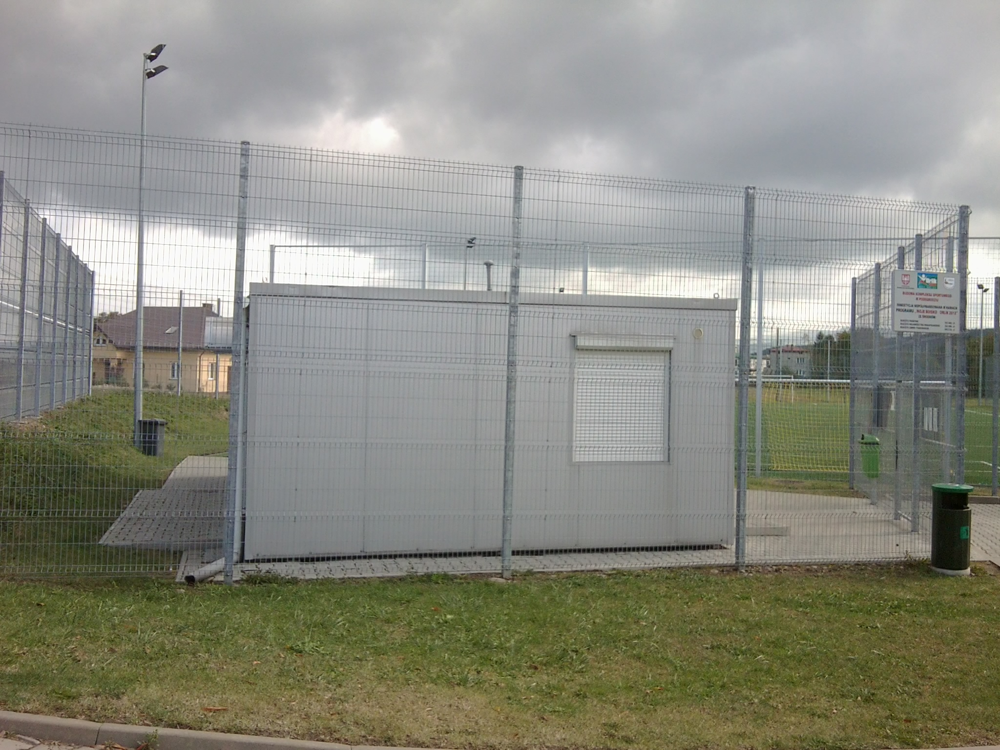 Szatnie na Orliku w Podegrodziu.